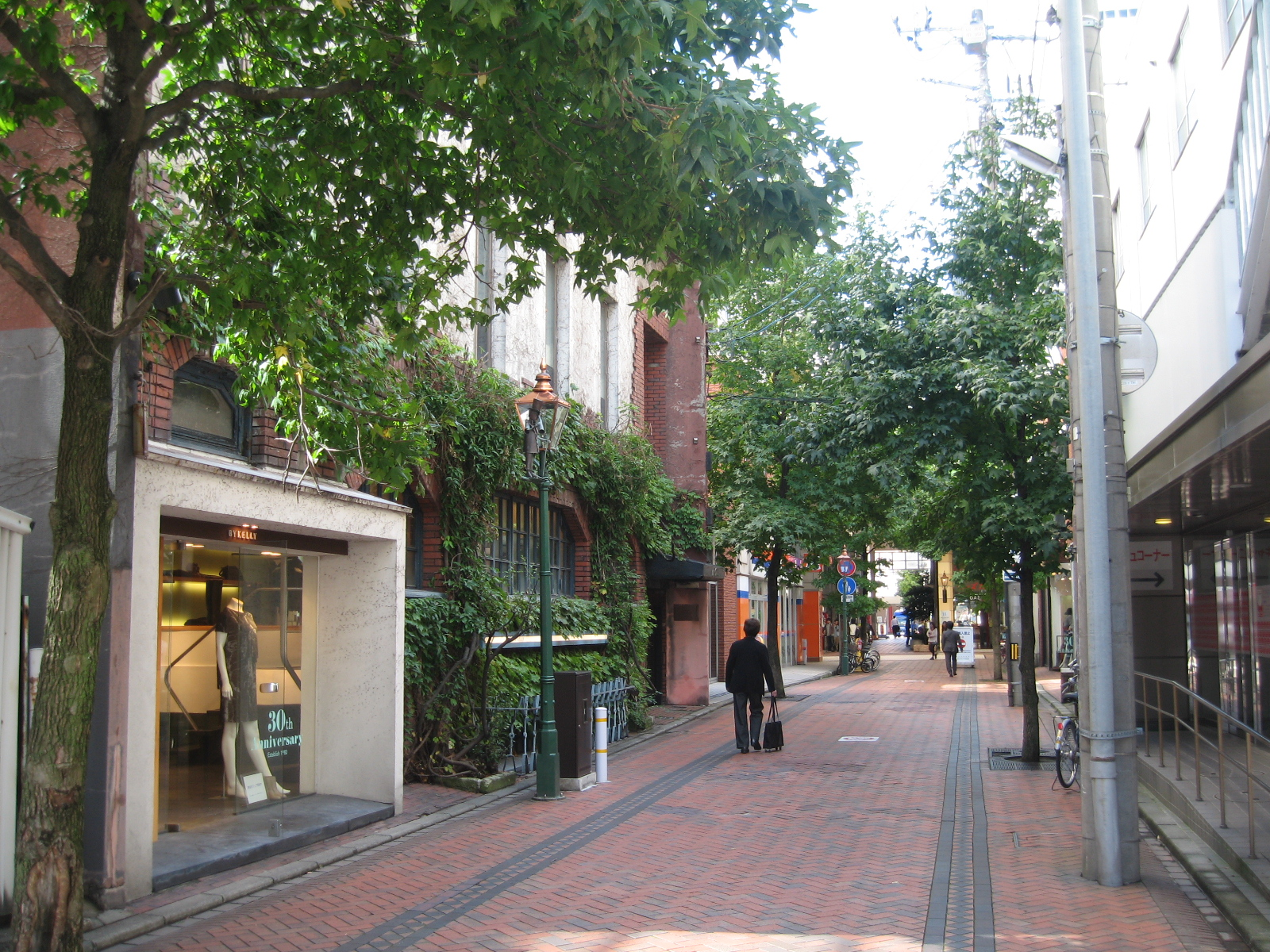 新潟県新潟市中央区。古町通7番町と交差する千歳小路の画像。